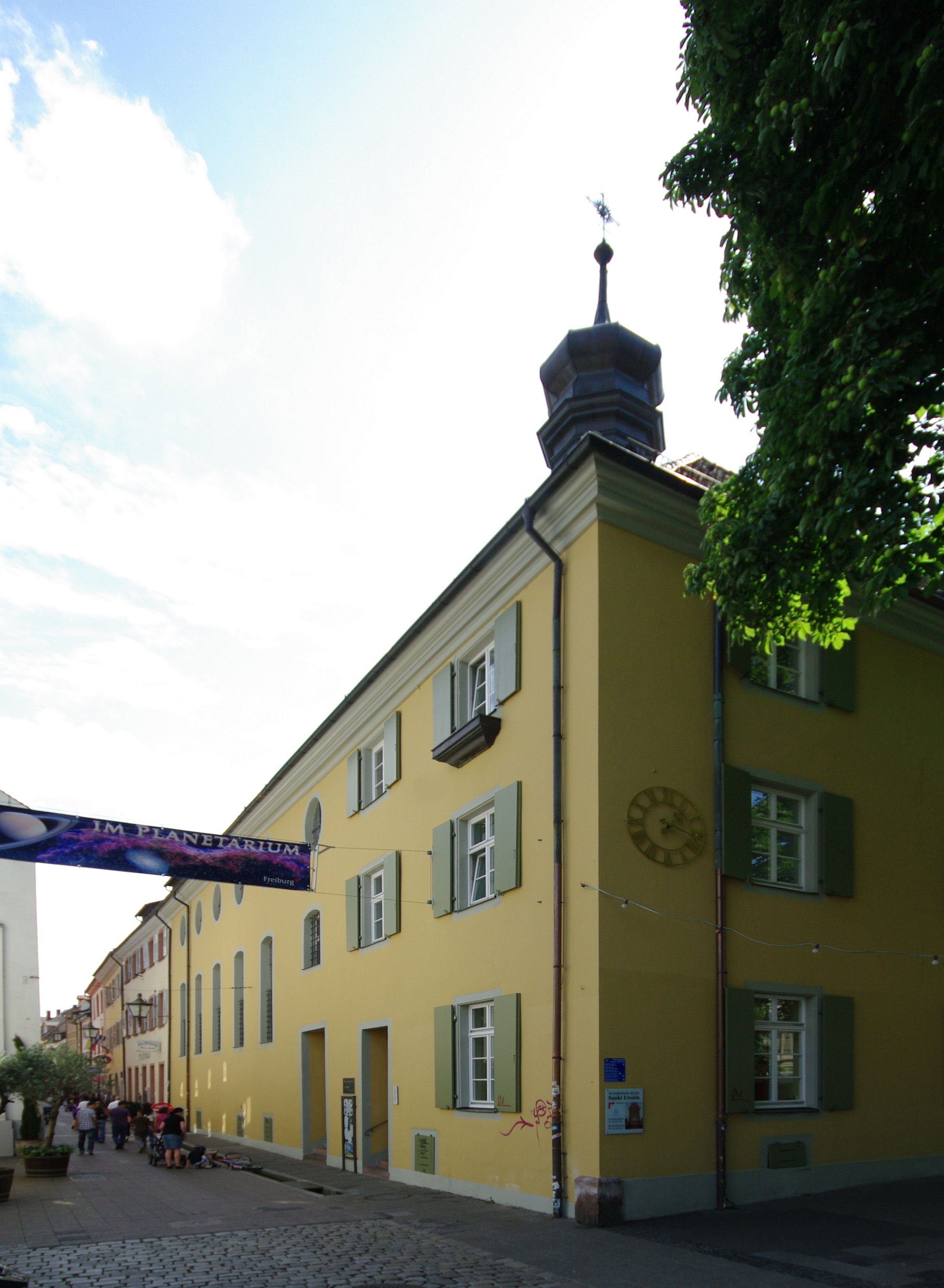 Kirche der Altkatholischen Gemeinde in Freiburg